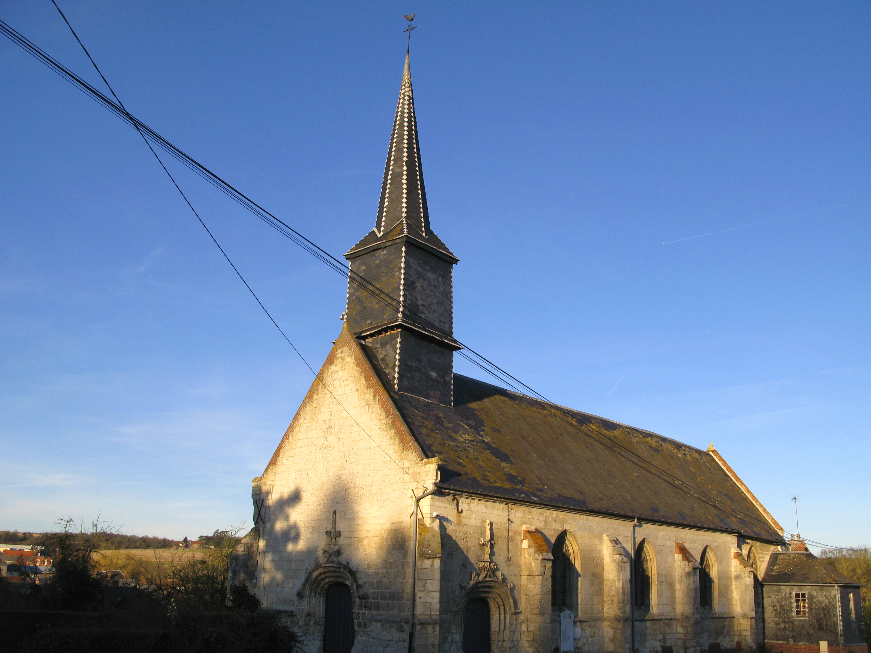 Famechon (Somme, France) - L'église. . .